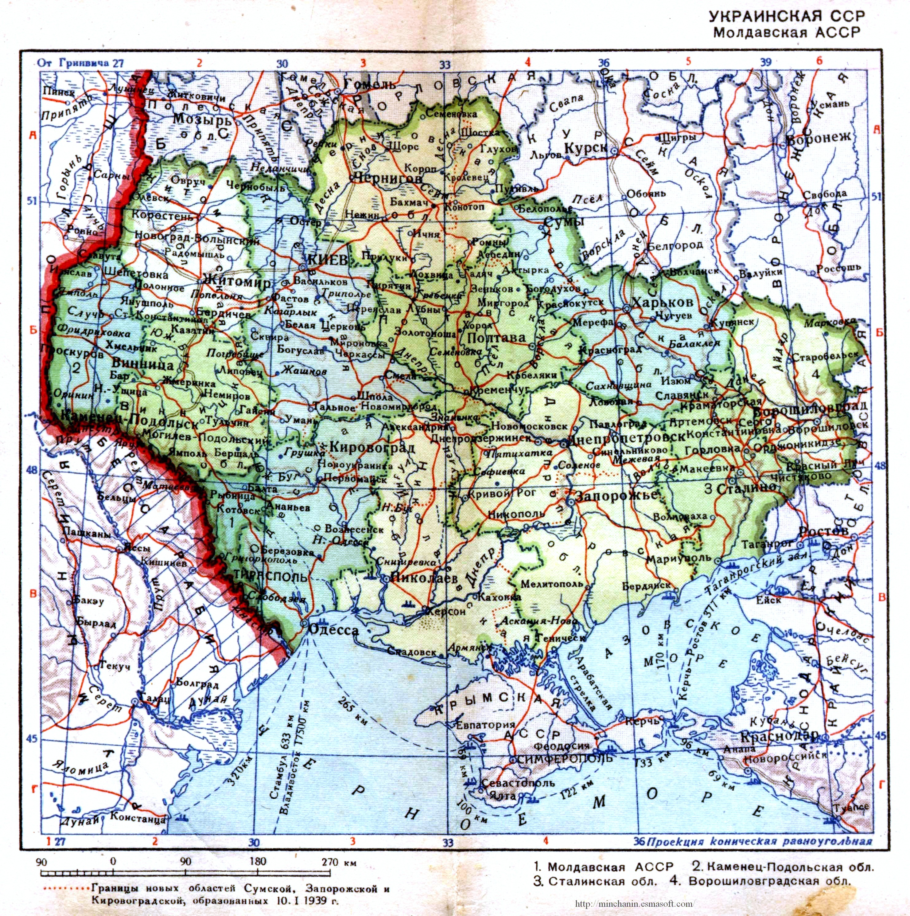 Ukrainian SSR (Украинская ССР).